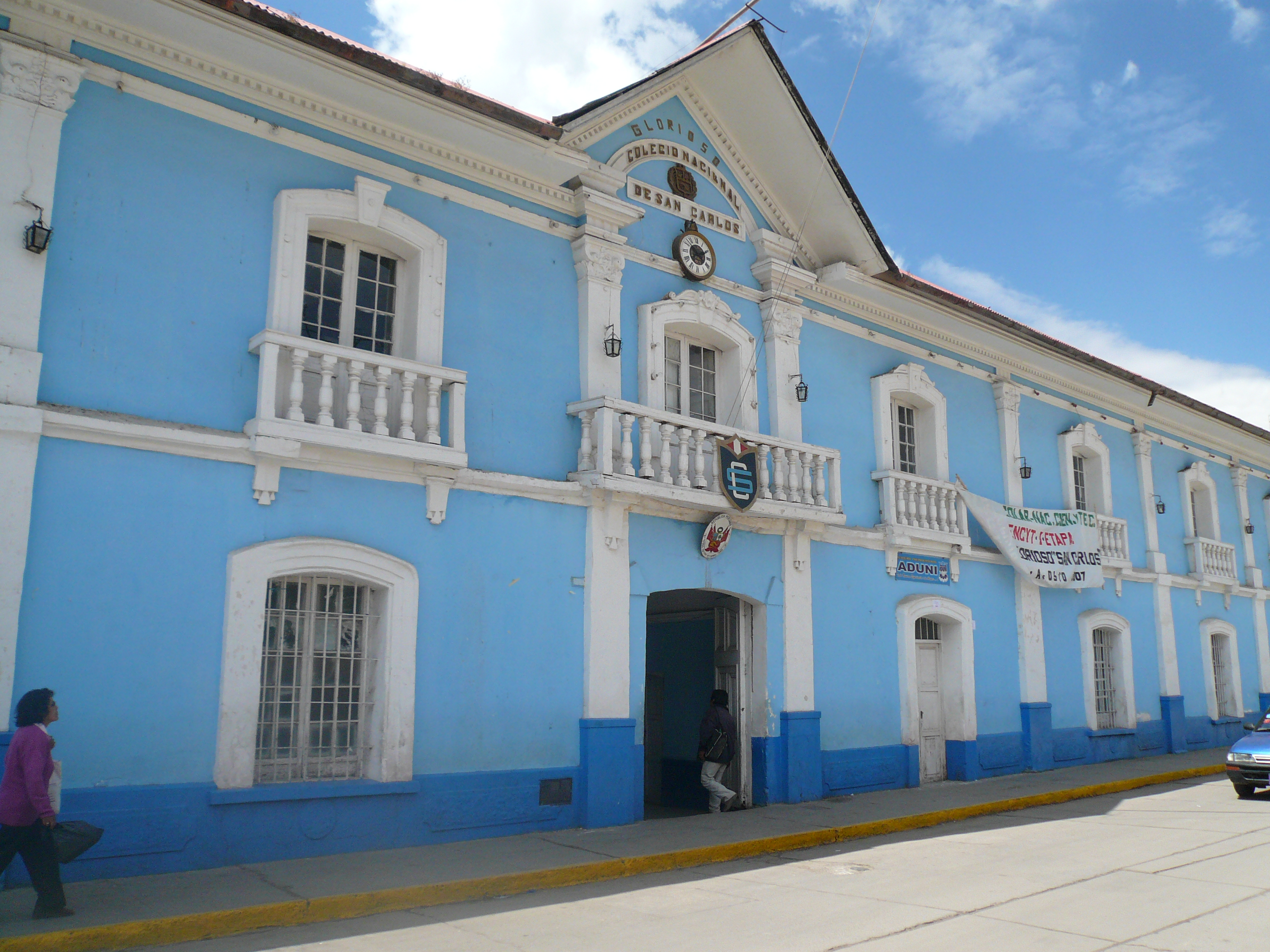 Vieja Casona, antes de la remodelación del Parque Manuel Pino